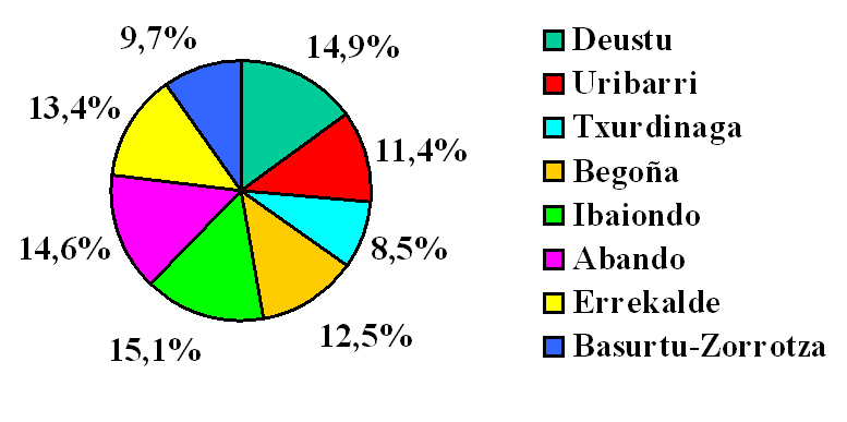 Bilboko biztanleriaren bilakaera.